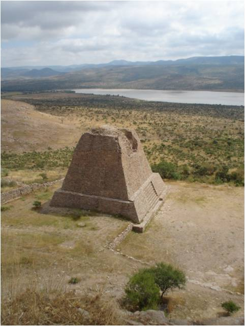 Pirámide votiva en la Quemada Zacatecas